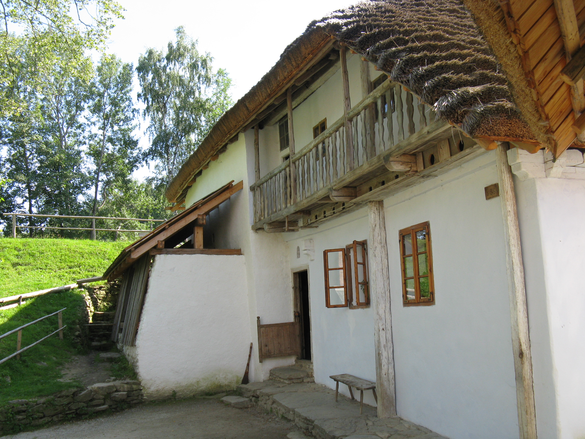 Středověký vodní mlýn v Hoslovicích - budova mlýnice s obytnou částí. V pozadí fotografie je za valem vodní náhon.